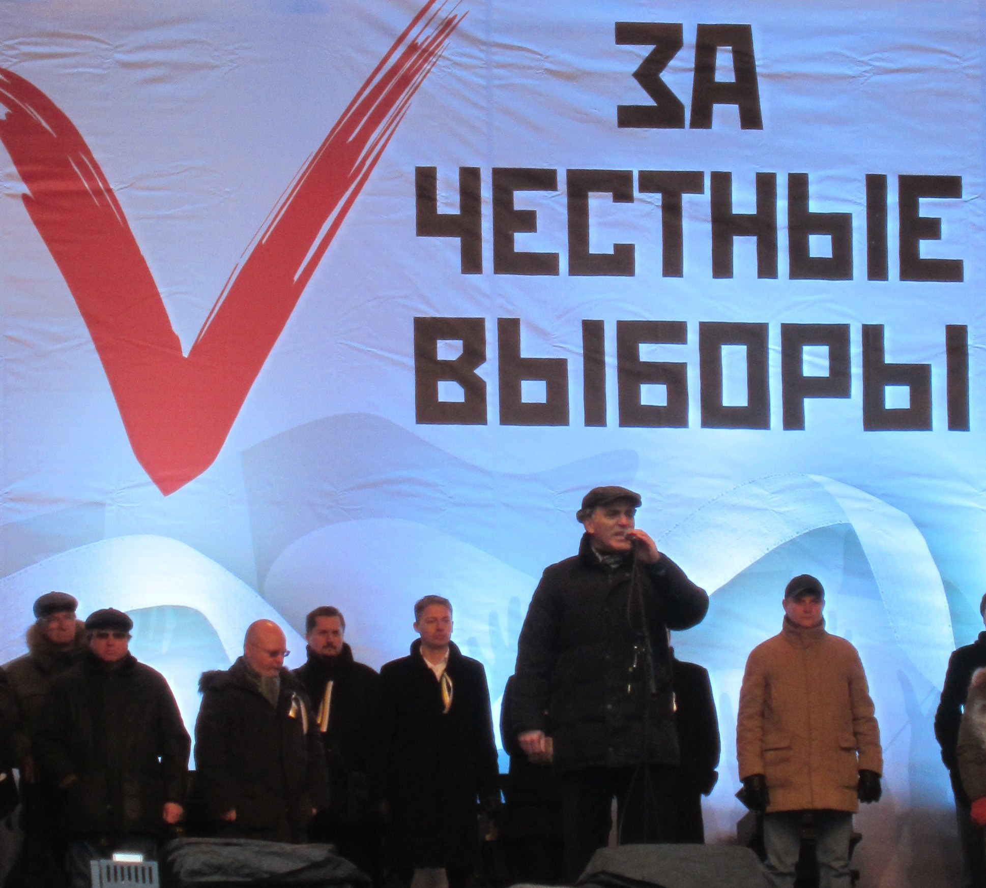 Митинг 24 декабря на проспекте Сахарова; выступление Гарри Каспарова с трибуны митинга